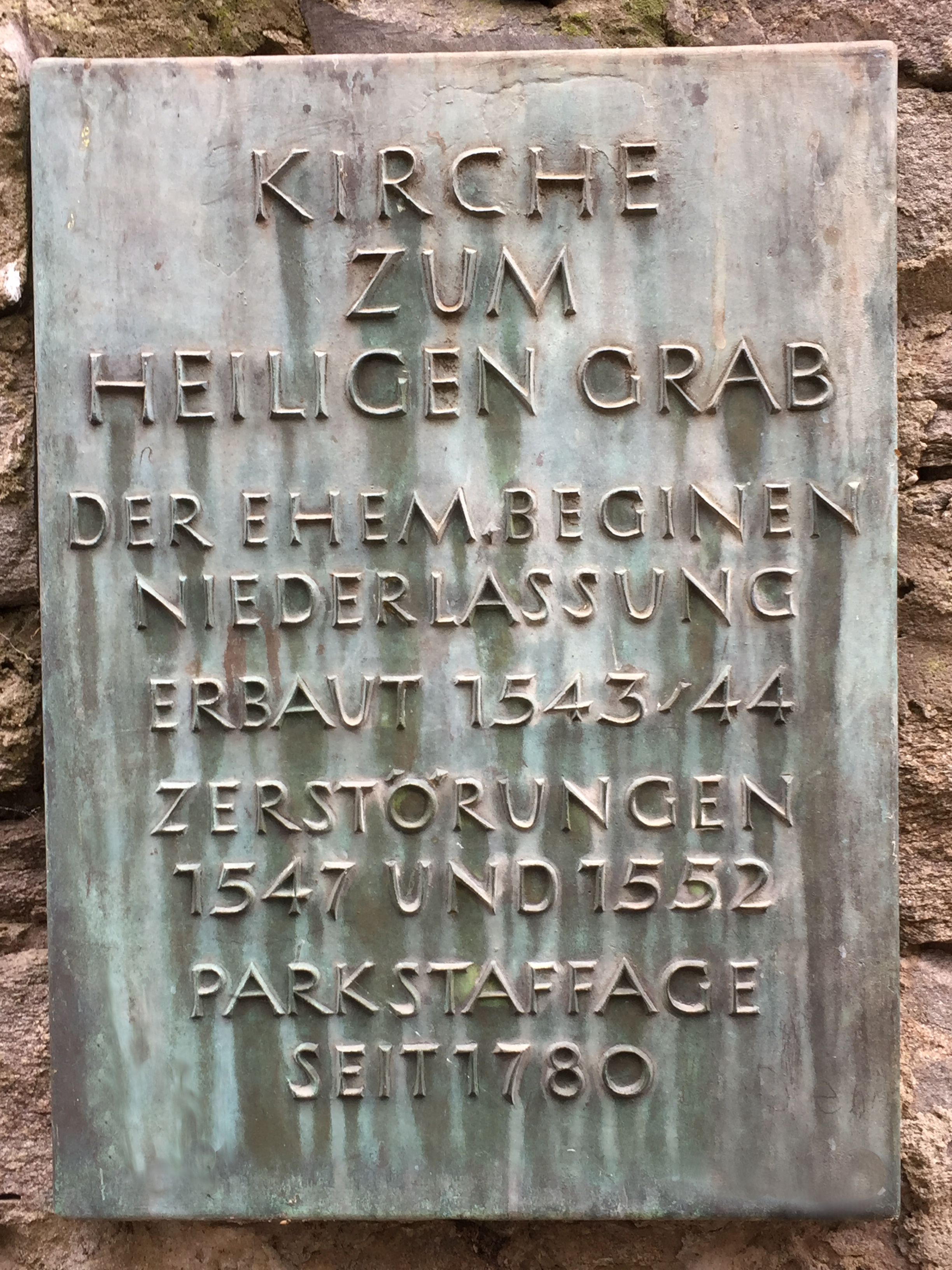 Die Erinnerungstafel an der zerstörten Heilig-Grab-Kirche im Aschaffenburger Schöntal-Park